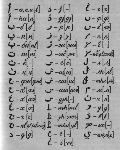 Алфавит Берсея (1855 год)